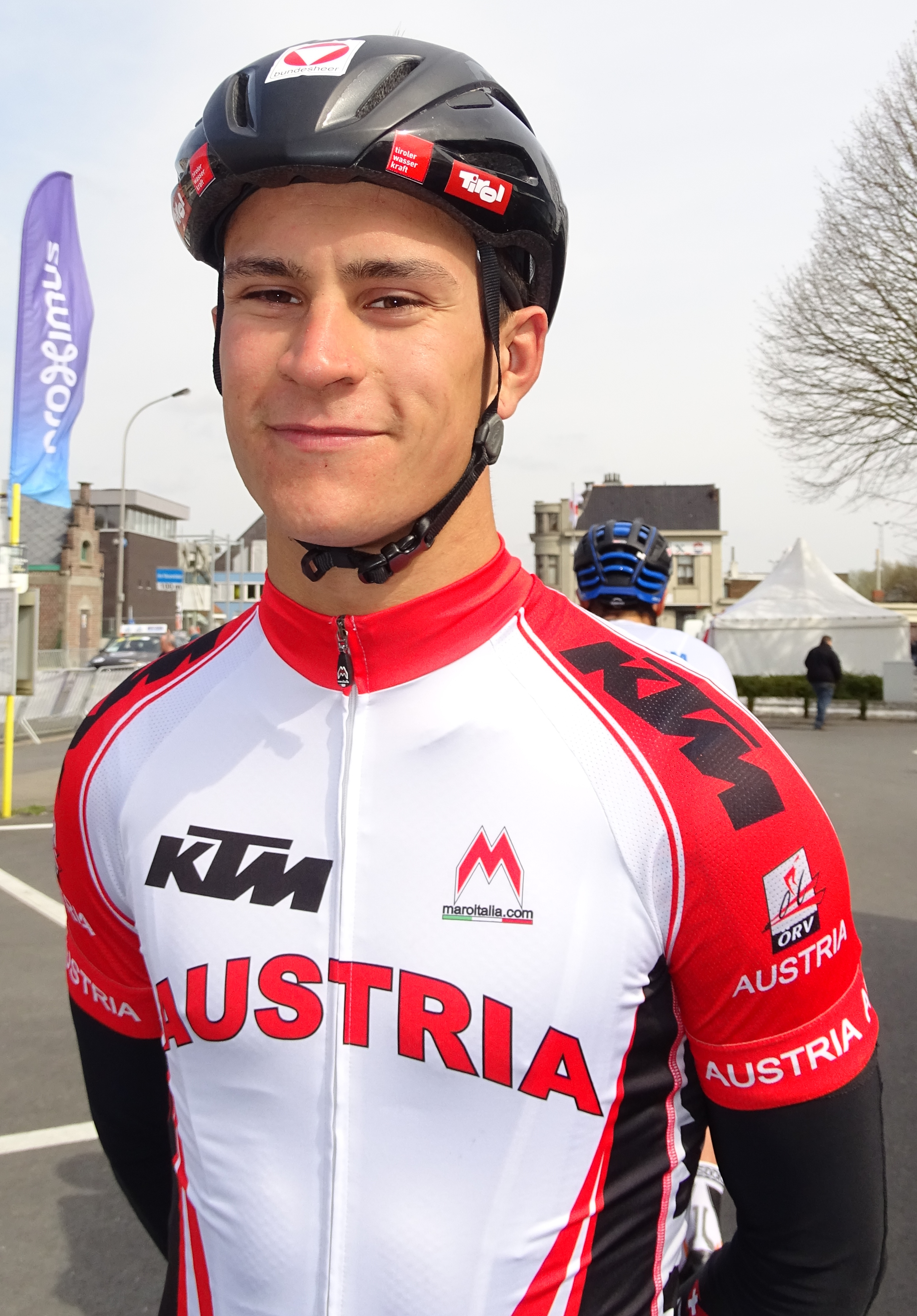 Reportage réalisé le samedi 9 avril à l'occasion du départ et de l'arrivée du Tour des Flandres espoirs 2016 à Audenarde, Belgique.